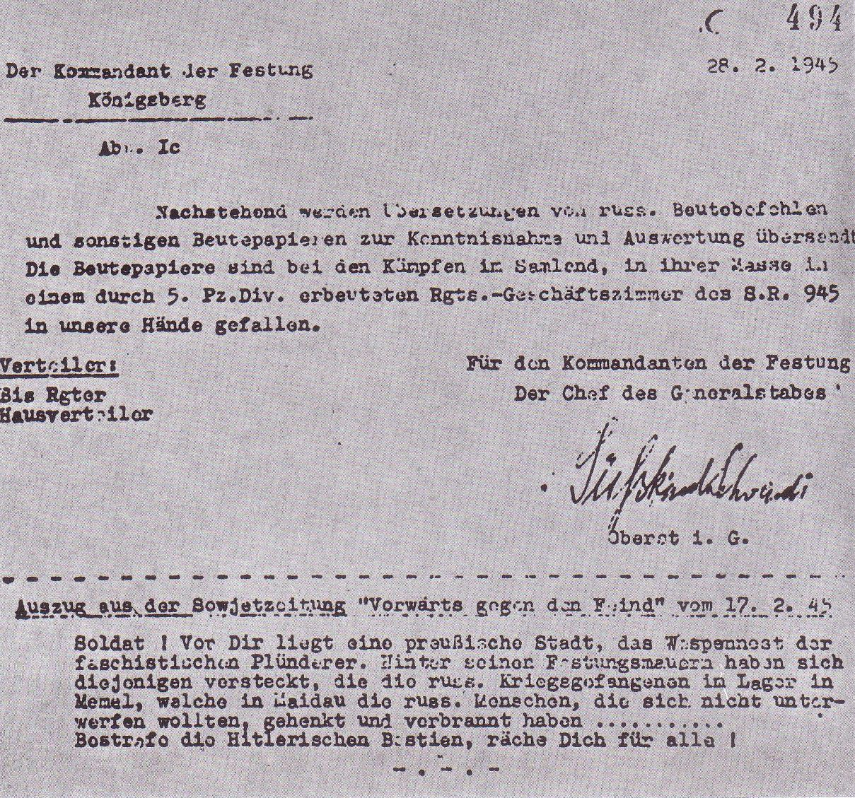 Military order, February 1945, Königsberg (Preußen)